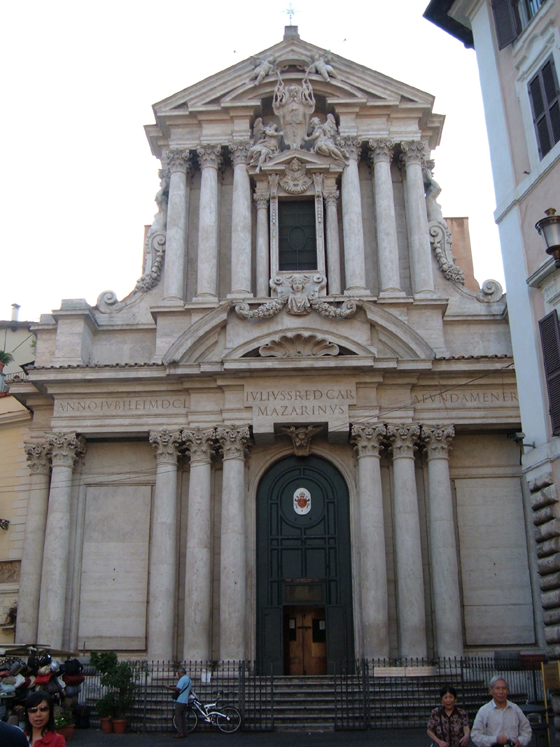 Chiesa dei Santi Vincenzo e Anastasio, a Roma, nel rione Trevi. Foto personale.